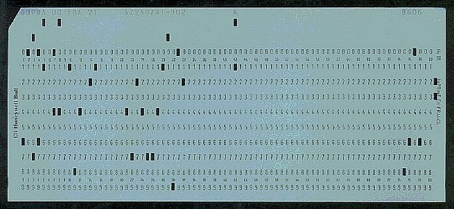 carte perforée, les chiffres de 0 à 9 sont codés par un seul trou ; les autres caractères (EBCDIC) sont codés à l'aide de 2 ou 3 trous.